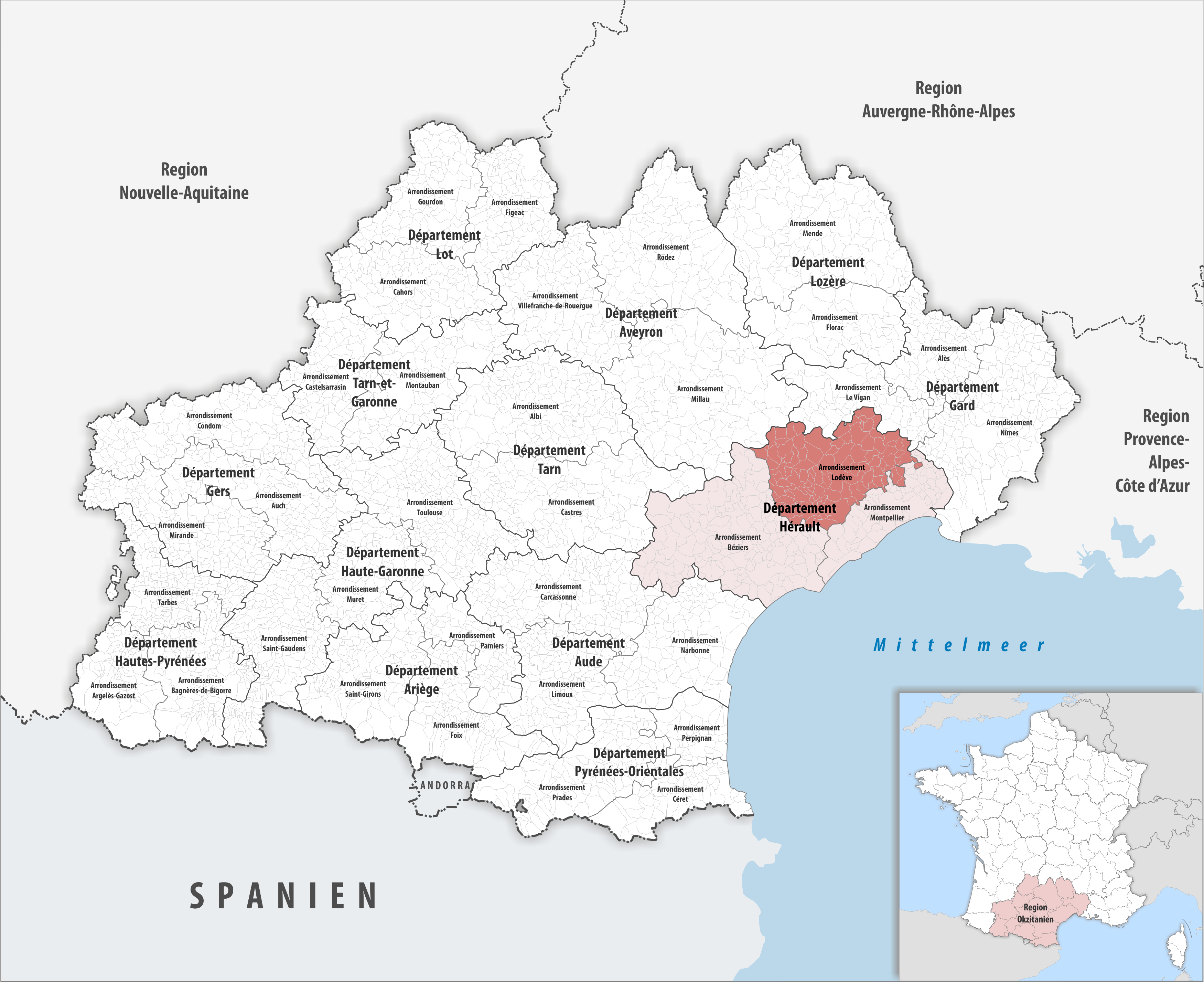 Lage des Arrondissements Lodève